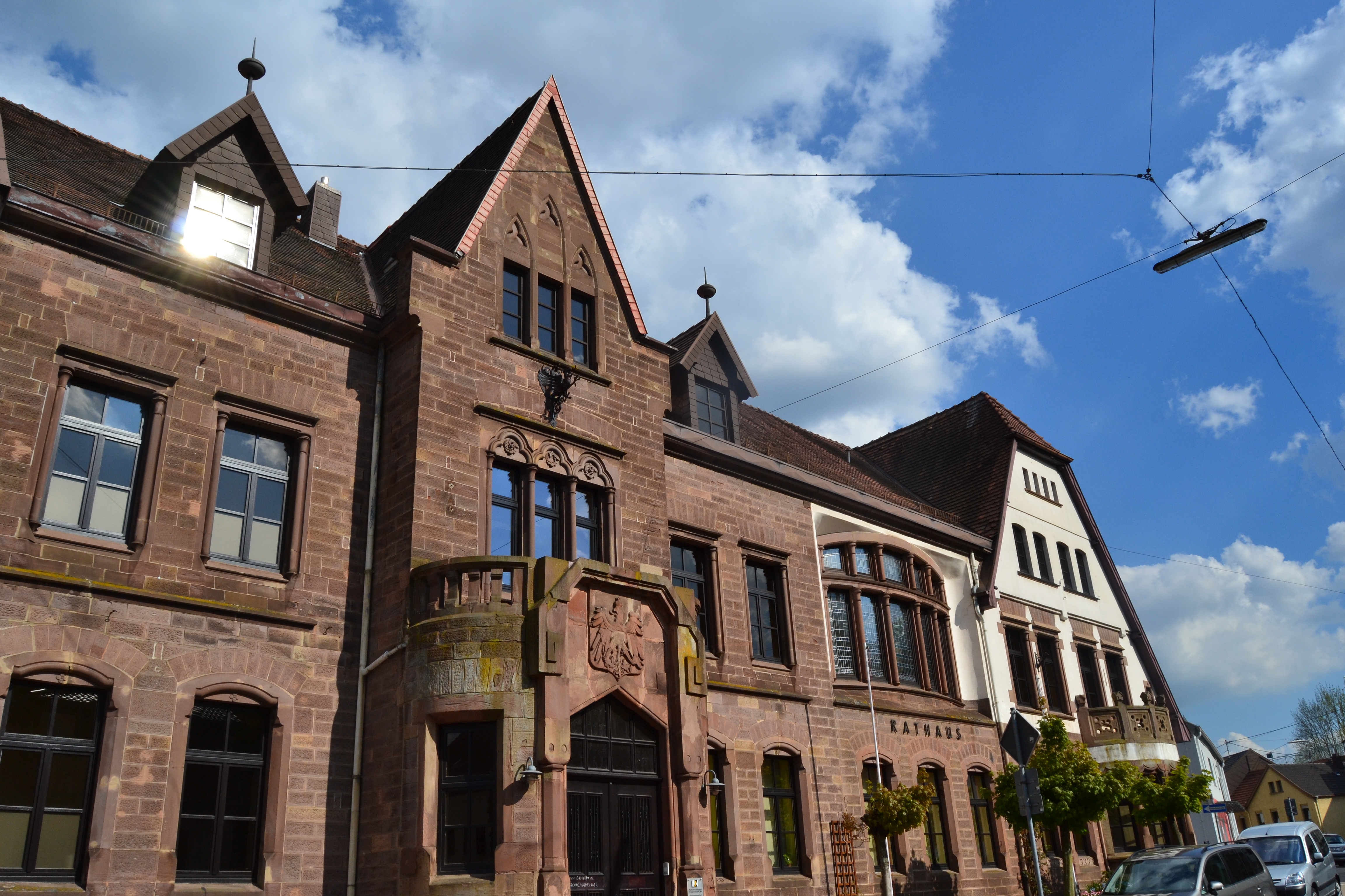 Deitsch: Illinger Rathaus